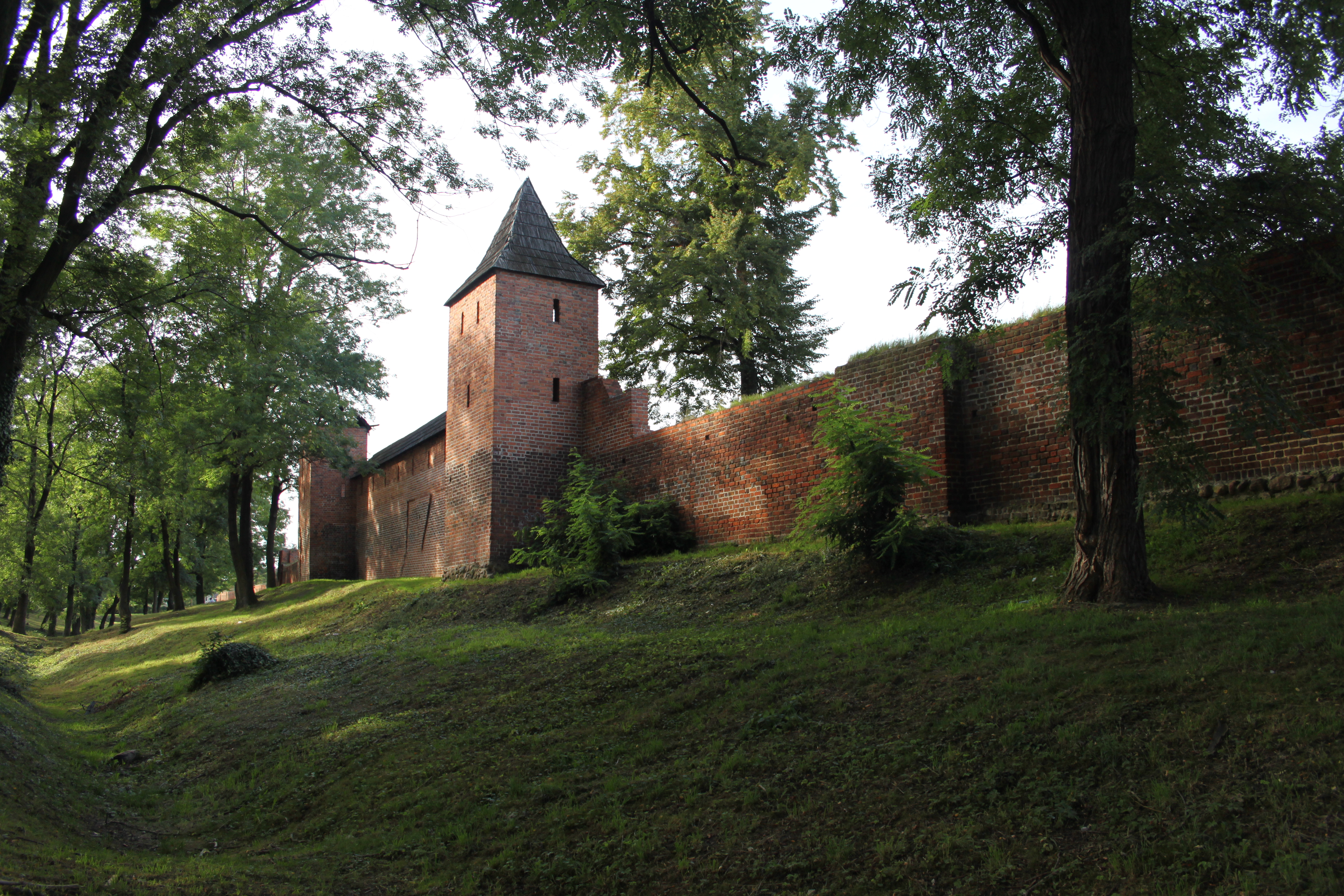 mury obronne, k. XIII-XIV Środa Śląska, Środa Śląska